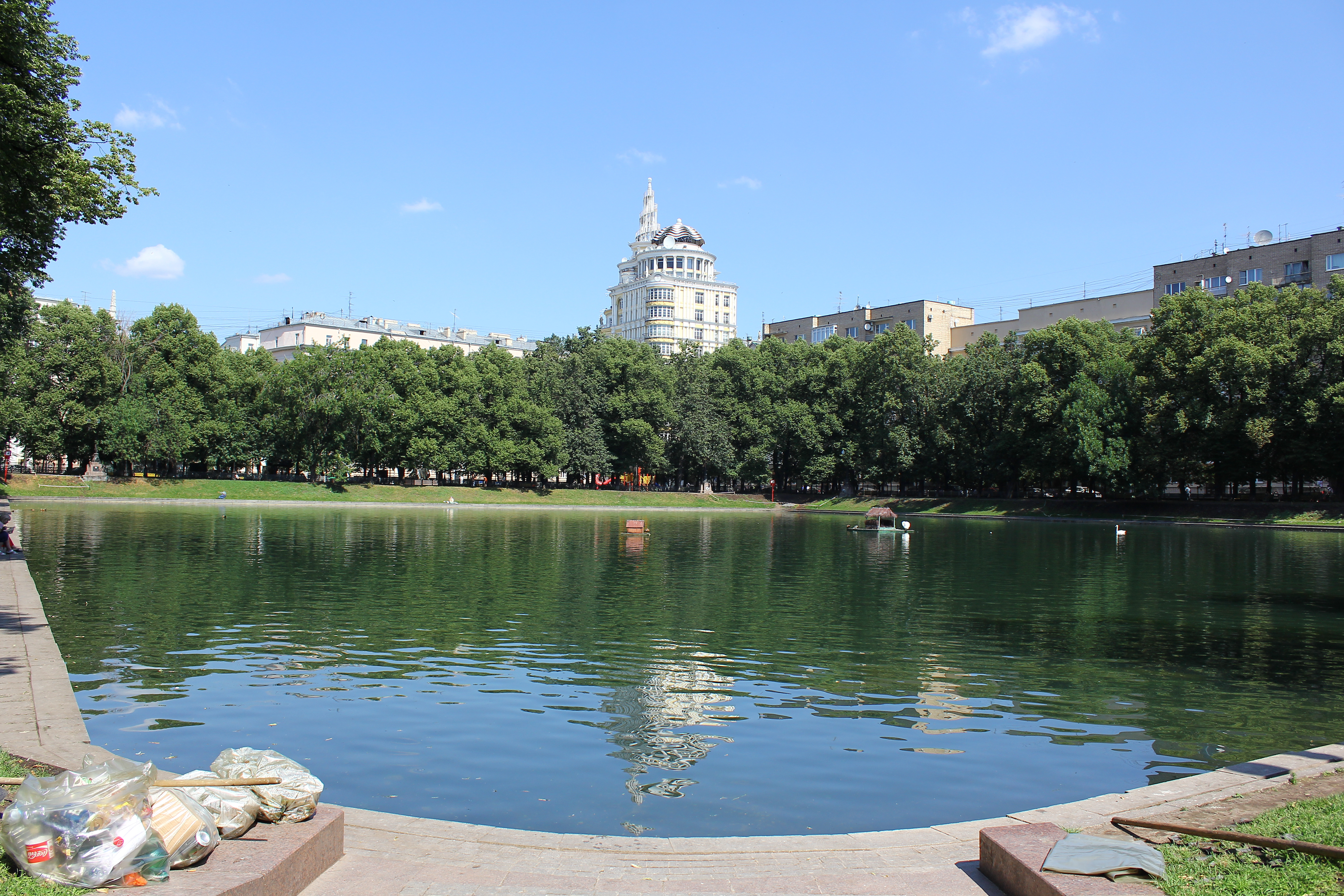 Патриаршие пруды в июле 2012 года